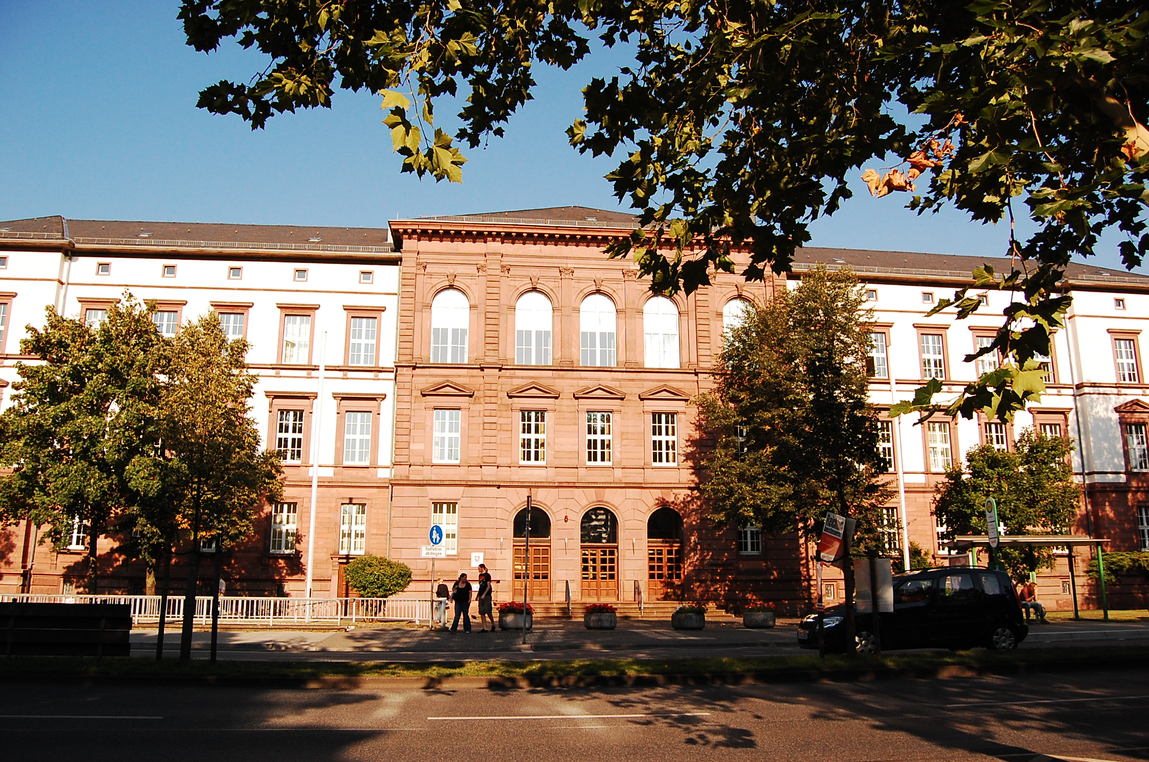 Landgericht Gießen, selbst fotografiert